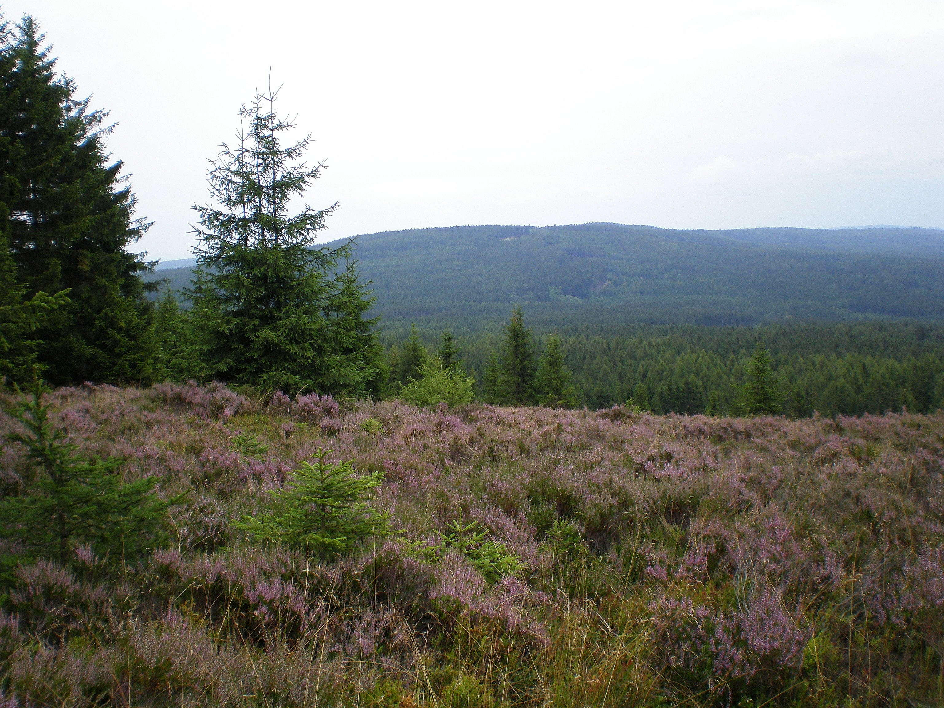 Vrch Brda (773 m) z Toku